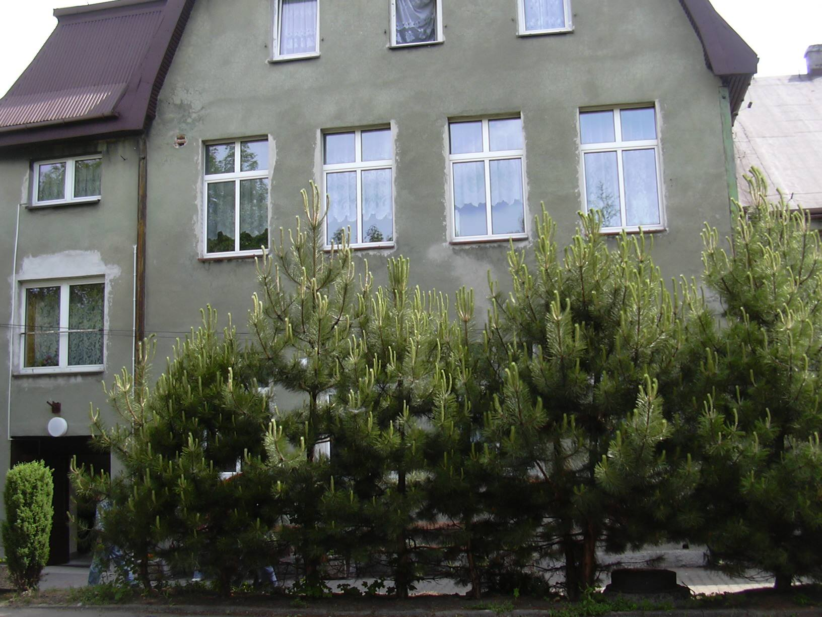 Budynek Stowarzyszenia Chorych na SM